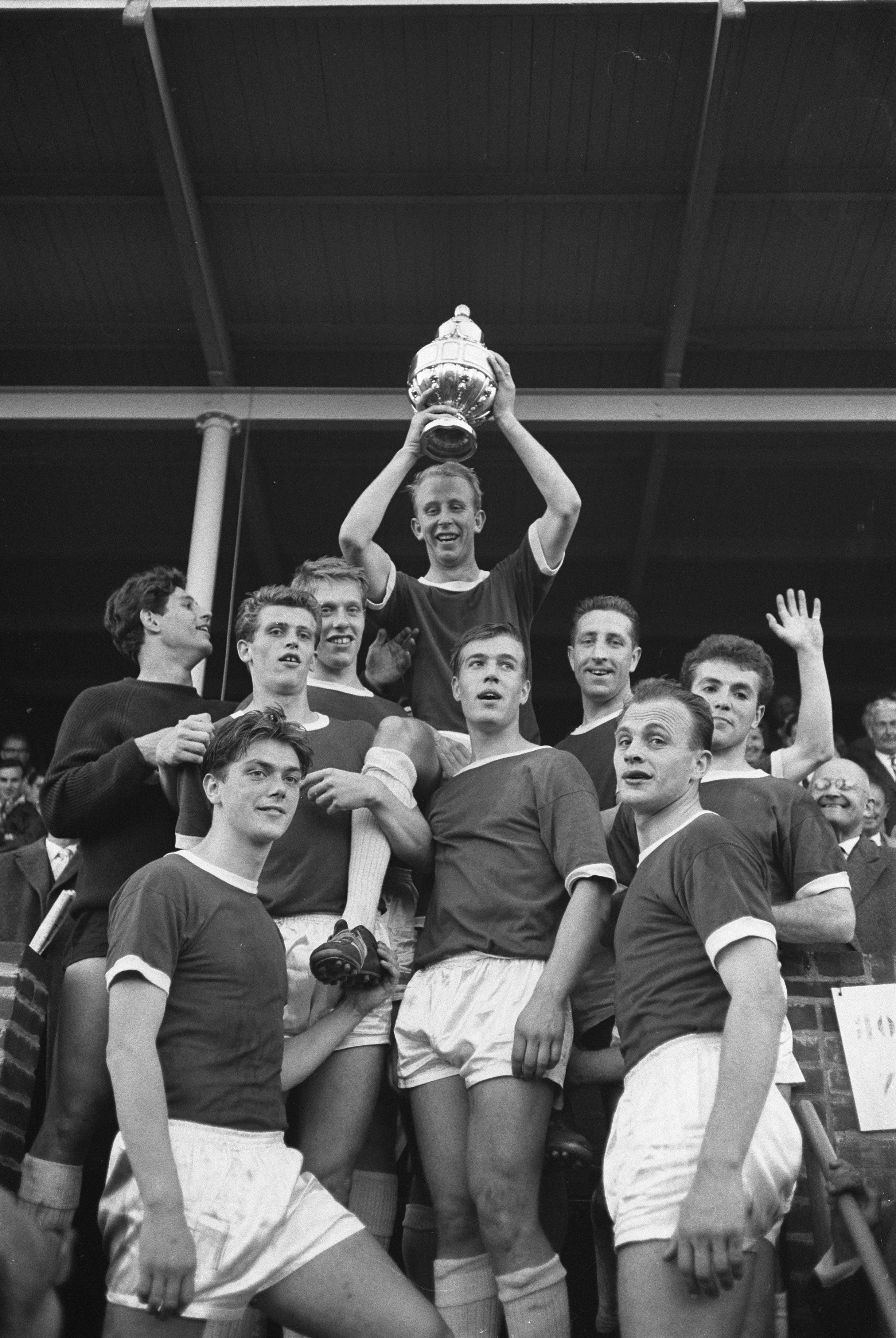 Collectie / Archief : Fotocollectie Anefo Reportage / Serie : [ onbekend ] Beschrijving : Finale KNVB-beker Ajax tegen NAC. Aanvoerder Henk Groot en de KNVB-beker Datum : 14 juni 1961 Trefwoorden : sport, voetbal Instellingsnaam : AJAX, NAC Fotograaf : Pot, Harry / Anefo Auteursrechthebbende : Nationaal Archief Materiaalsoort : Negatief (zwart/wit) Nummer archiefinventaris : bekijk toegang 2.24.01.05 Bestanddeelnummer : 912-5983